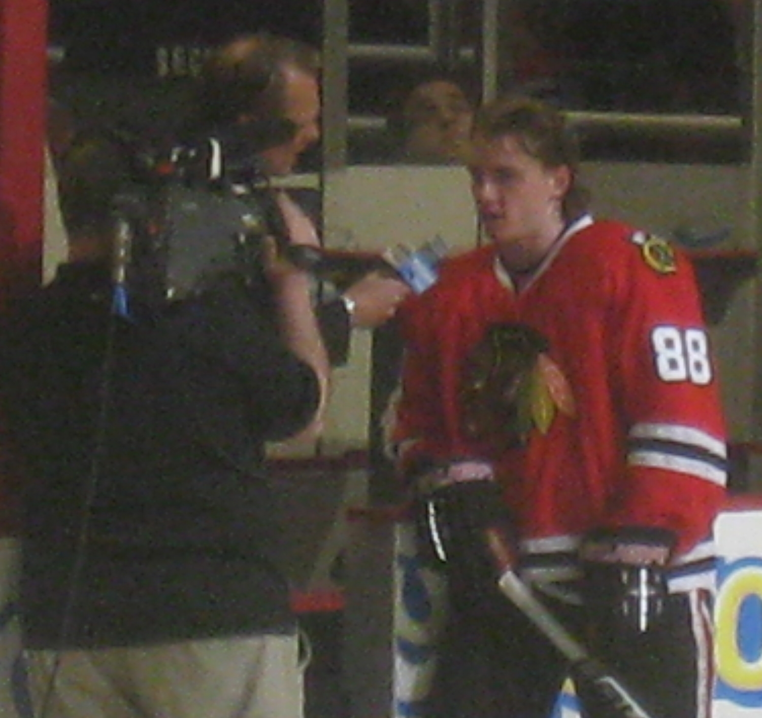 Post-game interview